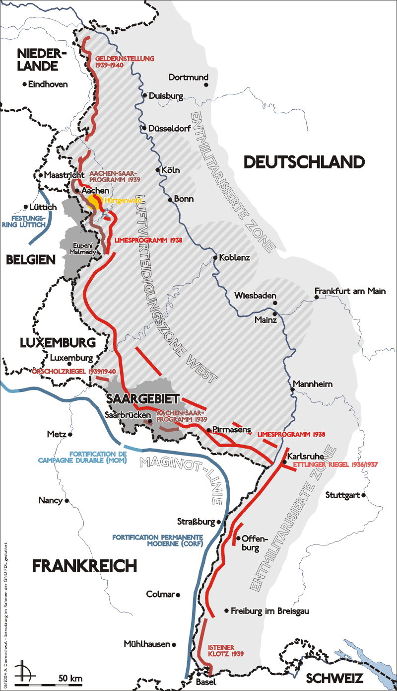 Darstellung zeigt Lage, Verlauf und bauliche Entwicklung des Westwalls. Zeichnung erstellt 2004 von Sansculotte. Bild ist unter der GNU FDL zur weiteren Verwendung freigegeben. Quellenangabe und Beleg an erbeten.